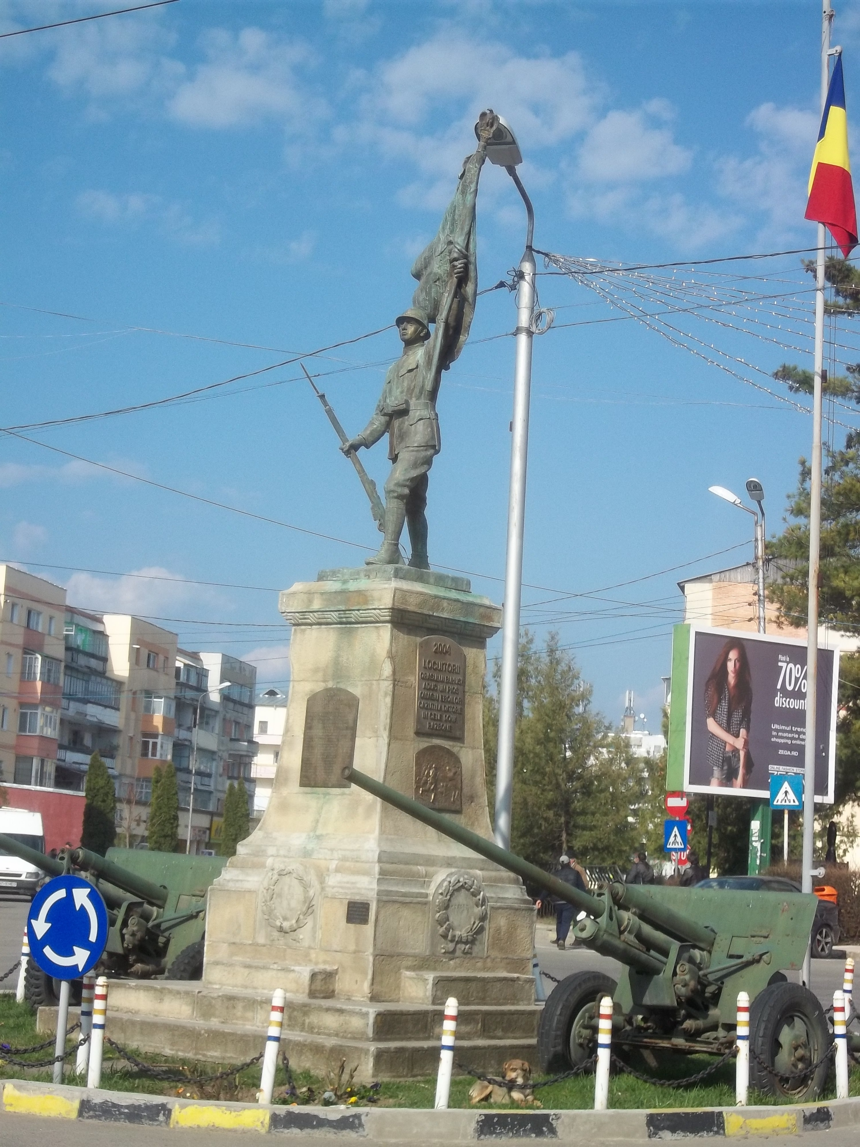 Monument din Localitatea Buhusi închinat soldaților din Primul Război Mondial